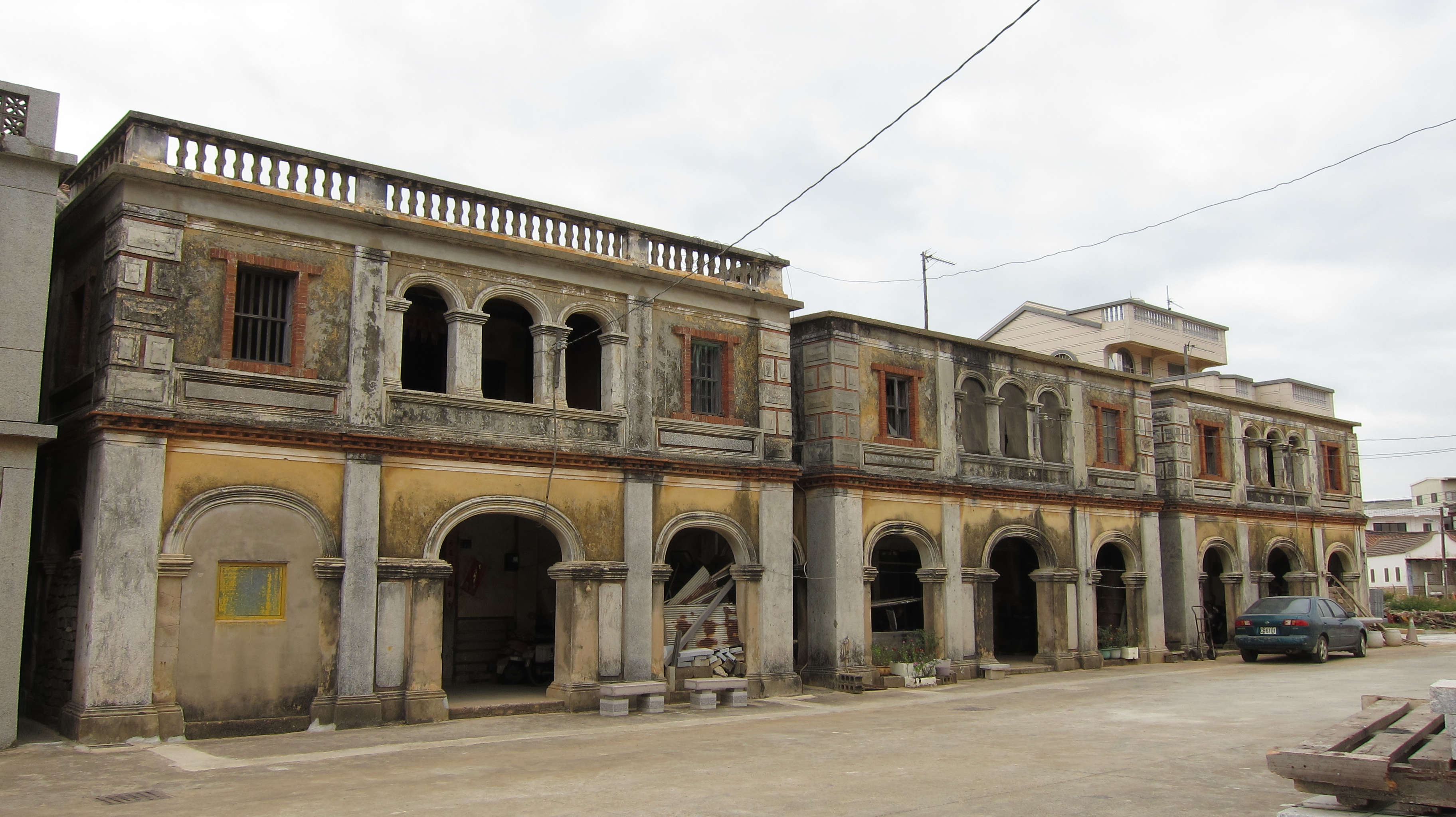 湖下三間樓仔